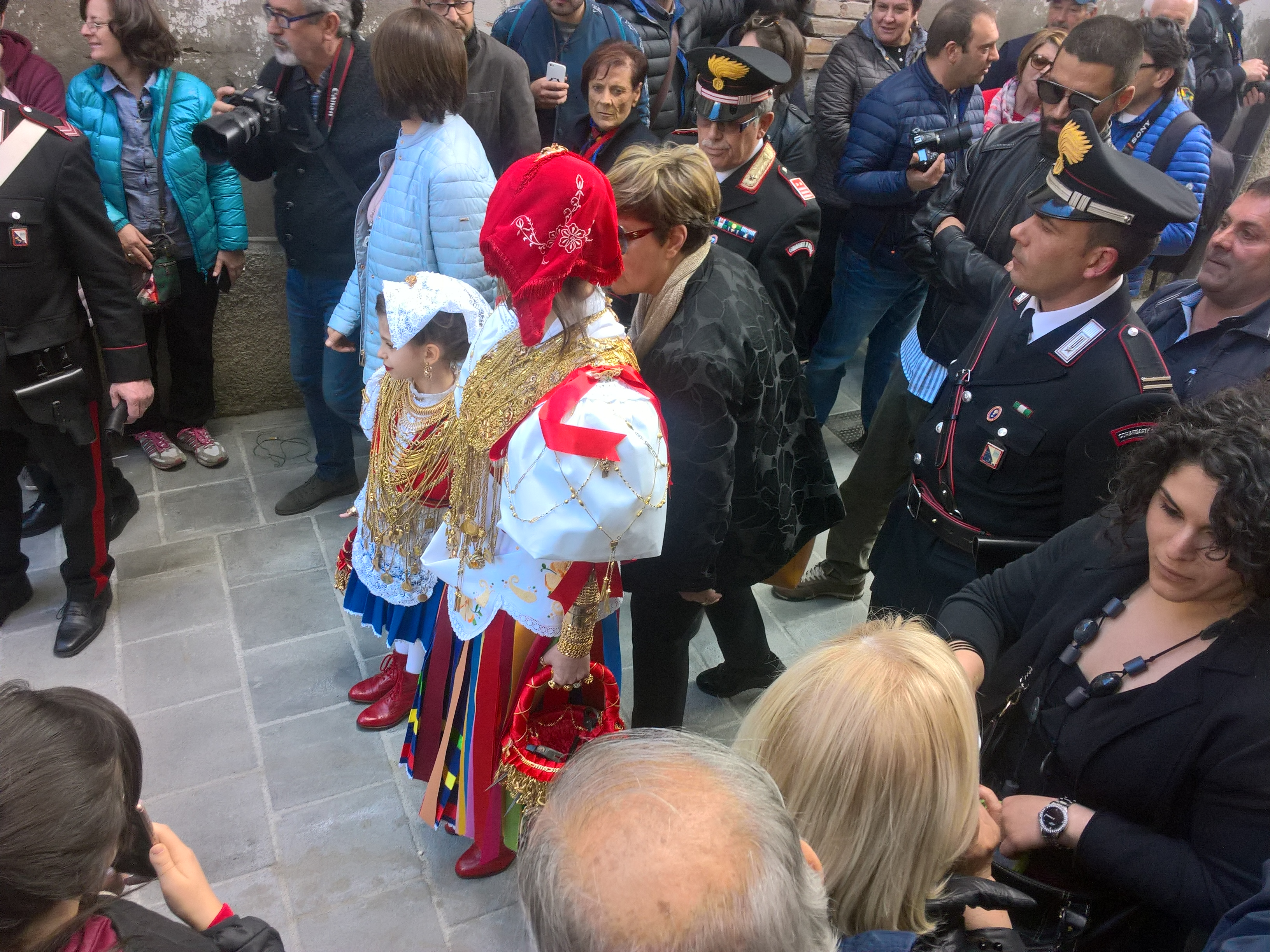 Zingara e Zingarella - Secondo la tradizione paesana, sia quella che fornì i chiodi rudemente forgiati, con i quali avvenne la crocifissione.